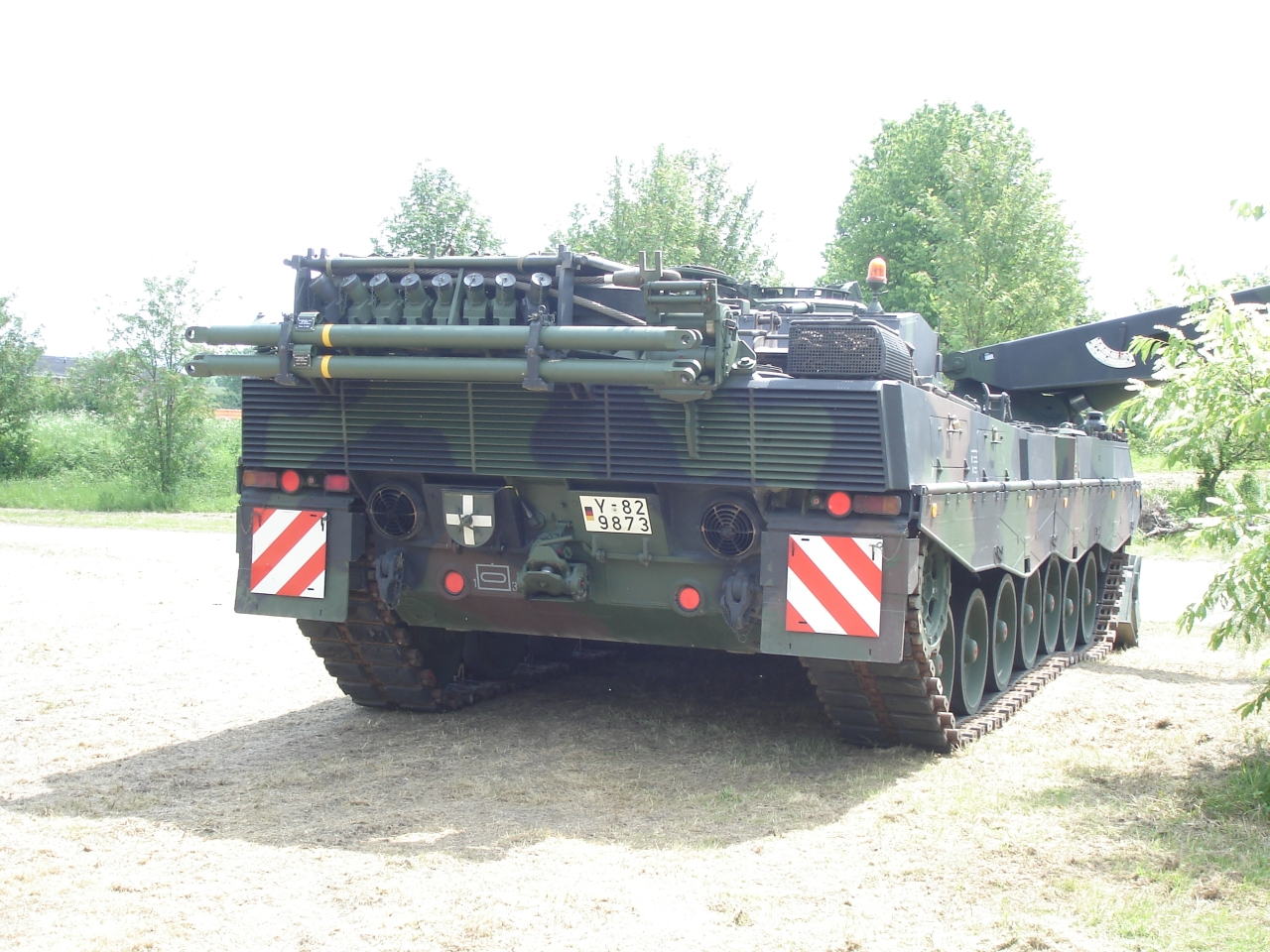 Bergepanzer „3“ Büffel, Heckansicht des 1./Panzerbataillon 393